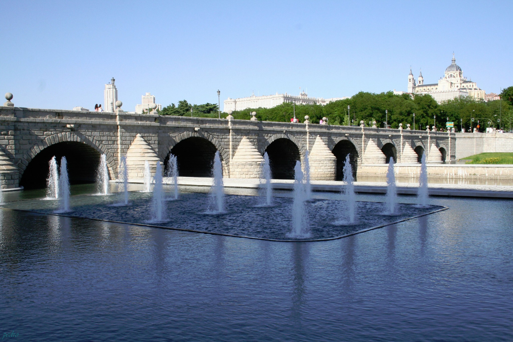 Pte Segovia desde Margen Derecho direccion Pte Toledo